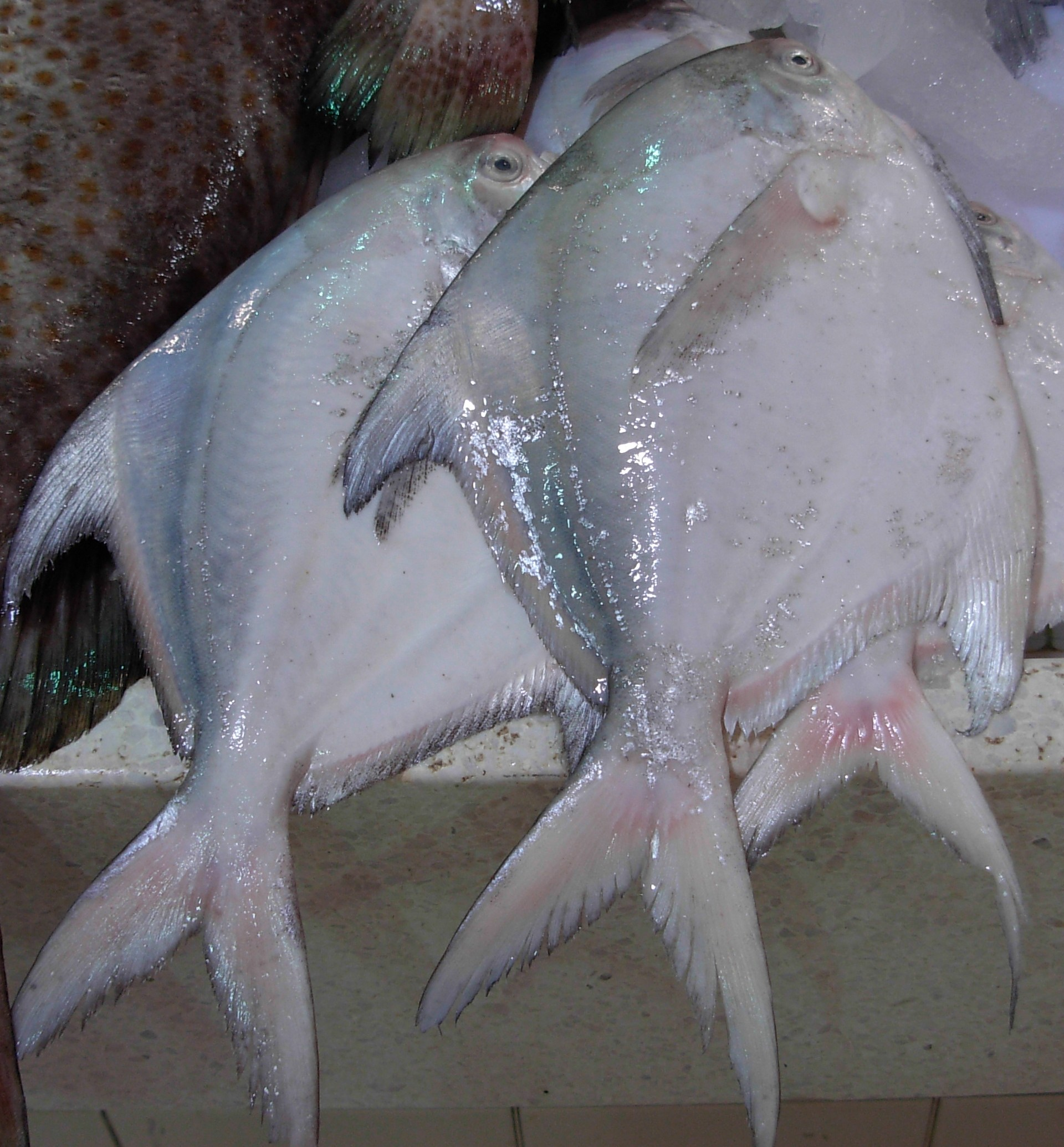 വെളുത്തആവോലി